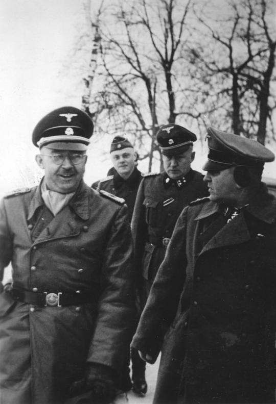 Der Reichsführer SS Heinrich Himmler auf einer Frontfahrt im Osten. Unser Bild zeigt den Reichsführer SS Heinrich Himmler im Gespräch mit SS Gruppenführer und Generalleutnant der Waffen-SS Ritterkreuzträger Eicke, dem Kommandeur einer Division der Waffen-SS. SS-PK-Aufnahme: Kriegsberichter: Wittmar (Sch.) 987-42 Jan. 42